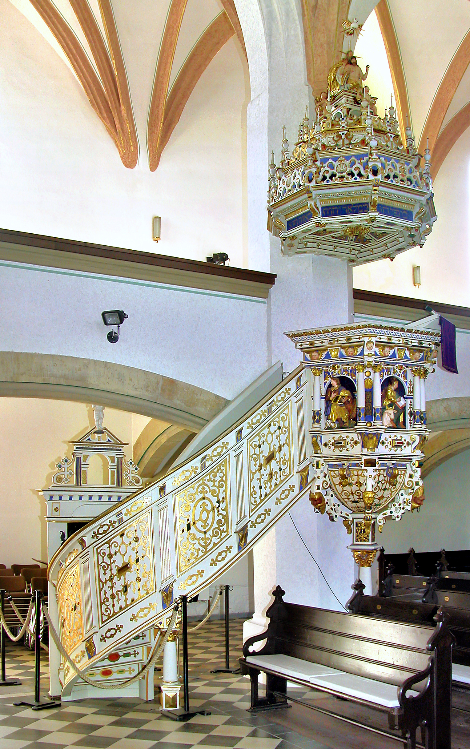 02.04.2009 04720 Döbeln: Nicolaikirche (1479-1485), Kanzel (1599, David Schatz) [DSCN35930.TIF]20090402265DR.JPG(c)Blobelt